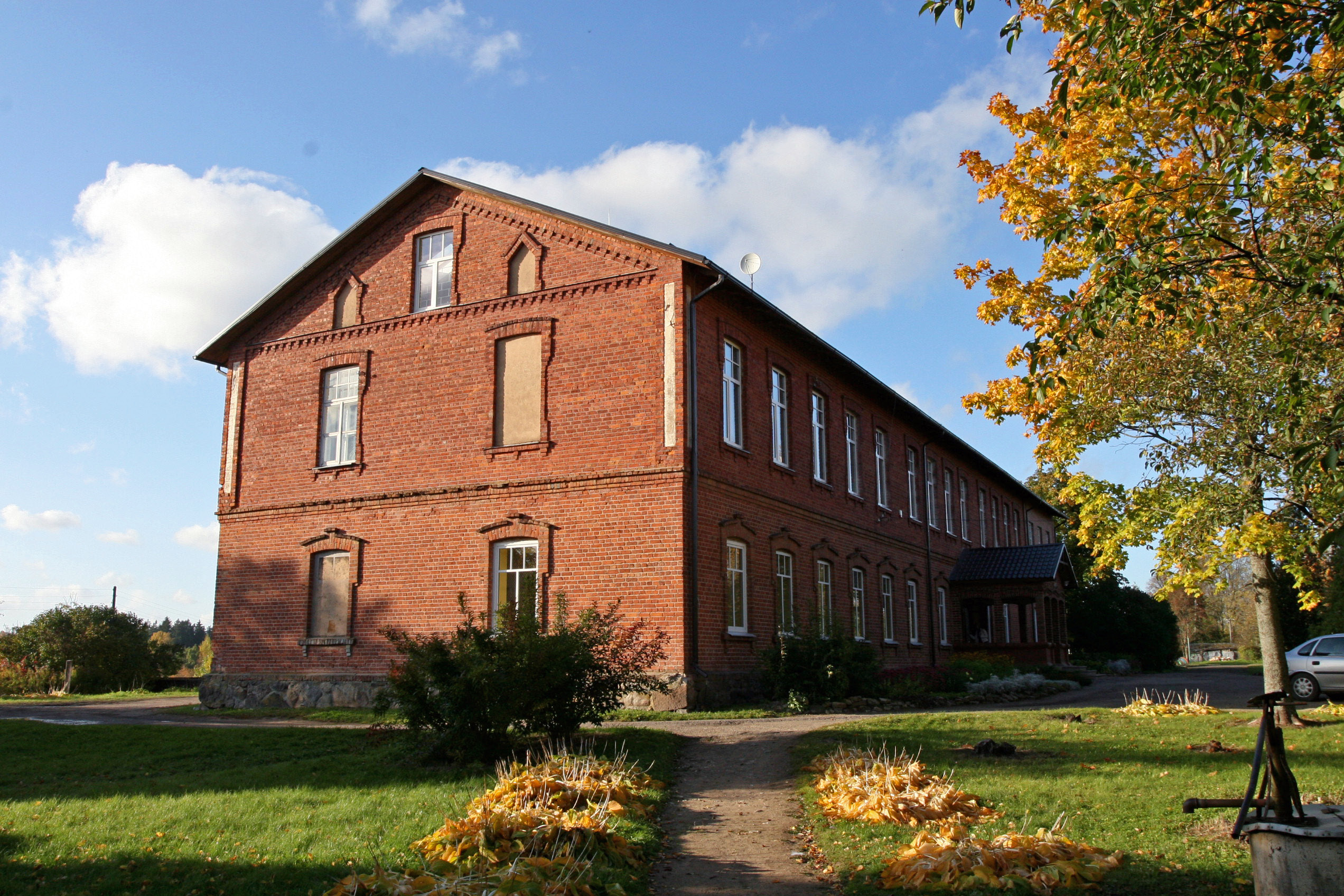 Sidgundas vecā skola